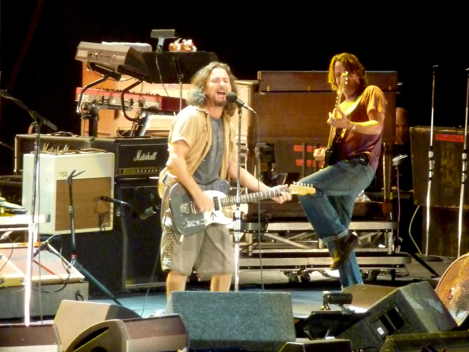 August 2009